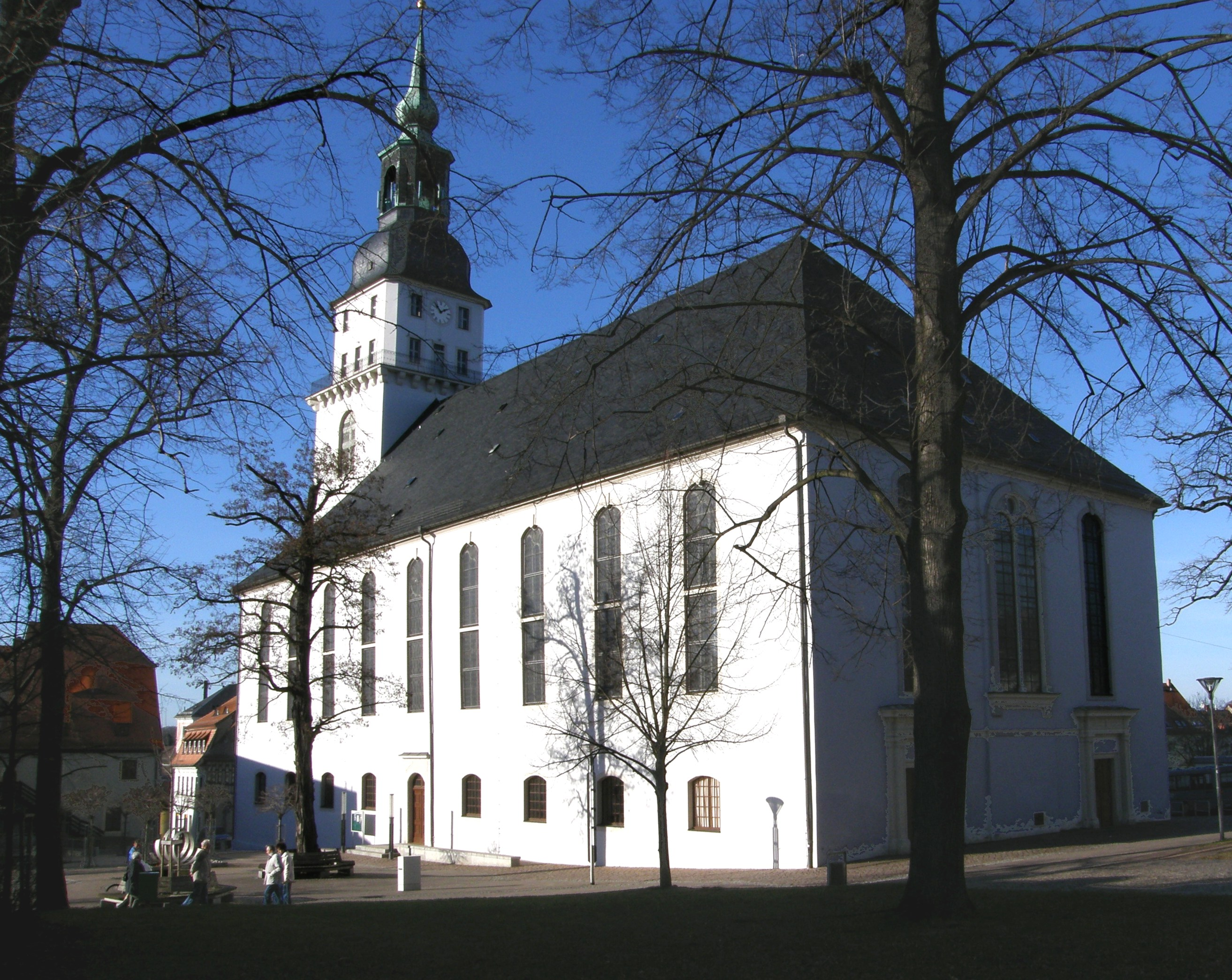 Frankenberg/Sa., evang. Kirche „St. Aegidien“